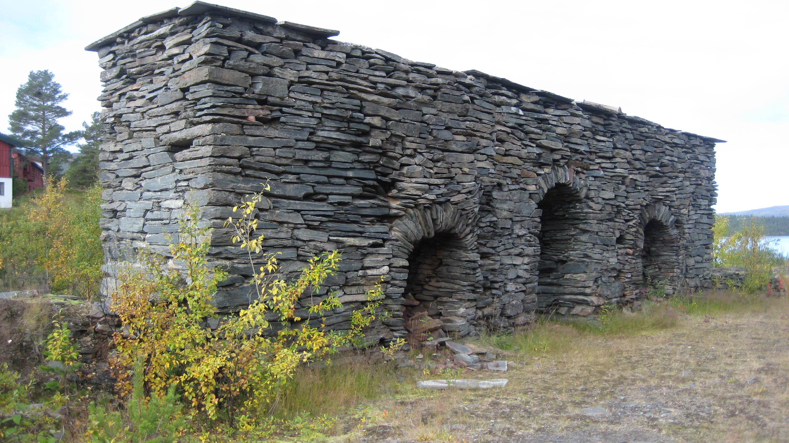 Smelteovn fra nikkelverket i Espedalen